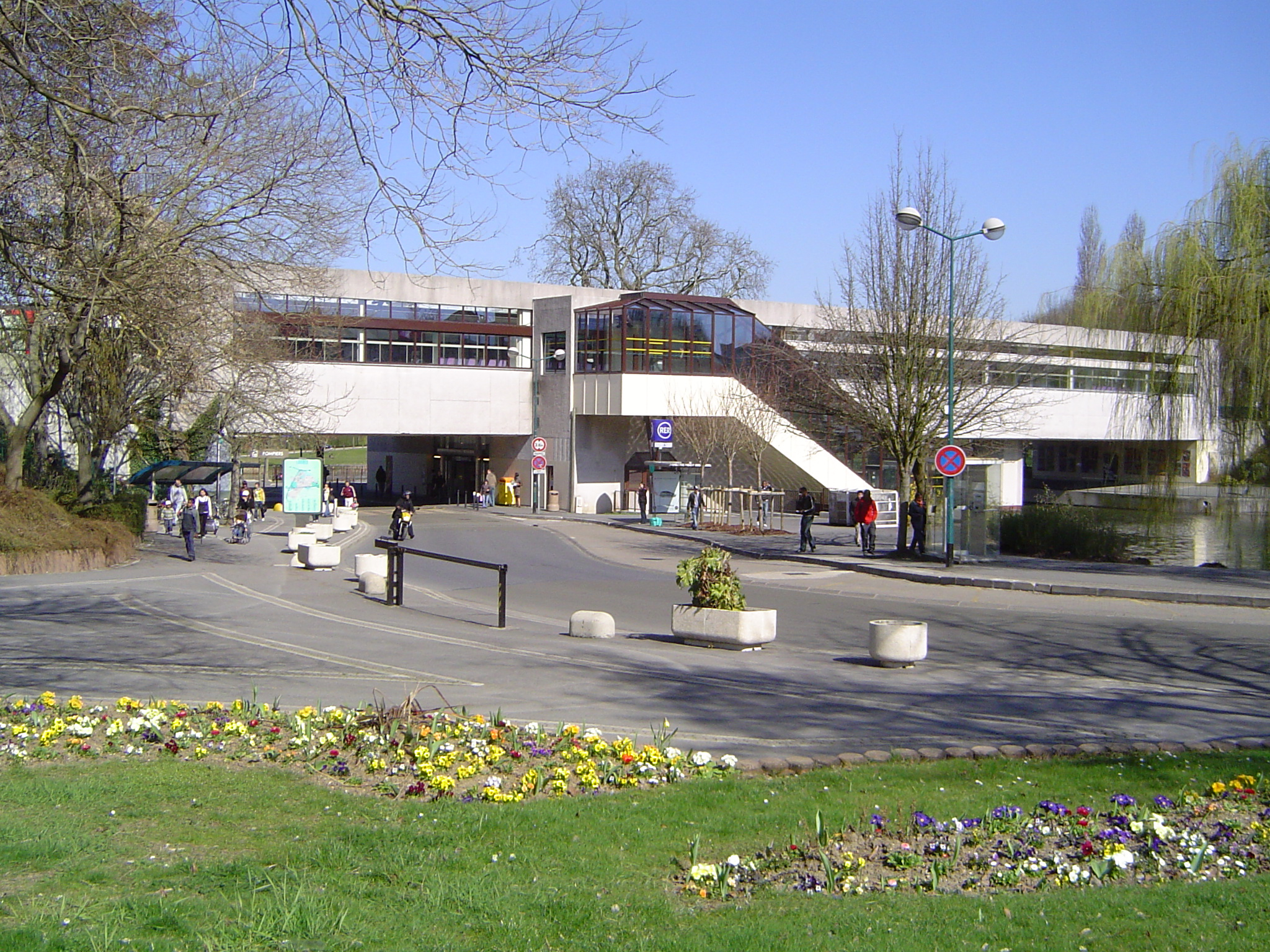 Photos prises à Lognes, commune française de Seine-et-Marne